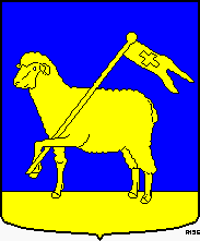 Gemeentewapen Velsen